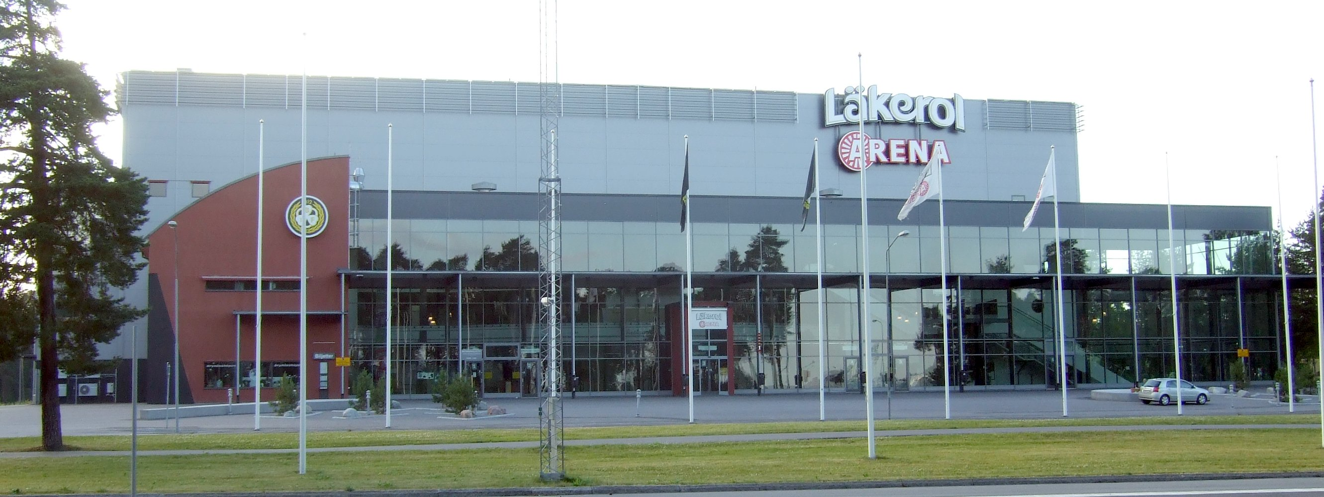 Läkerol Arena, Gävle, Sweden